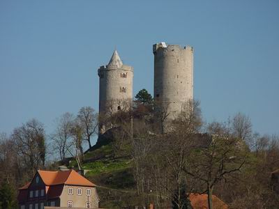 Burg Saaleck public domain, eigenes Foto von 2003 Mewes